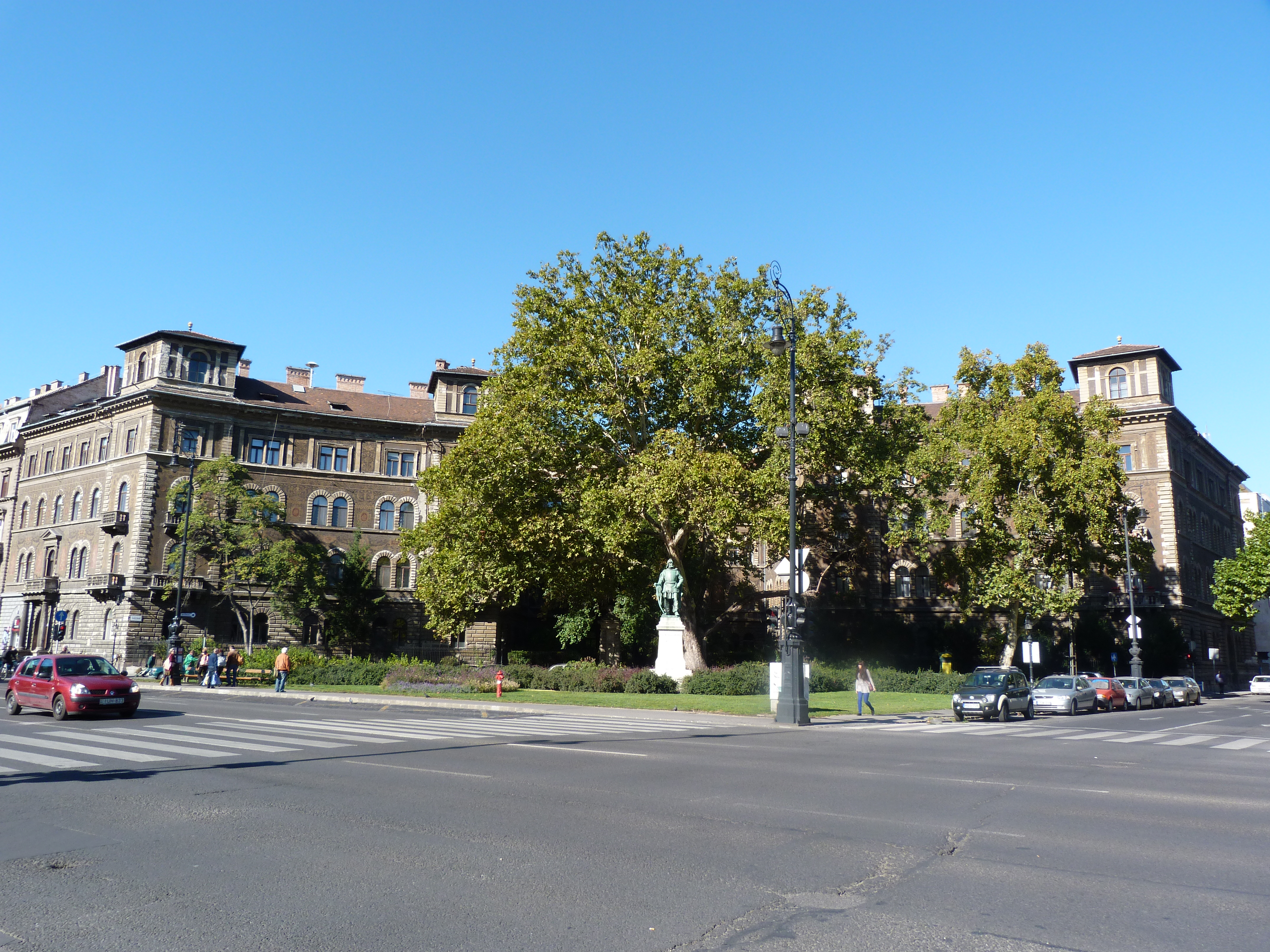 A felvétel 2013. Október 3 –án csütörtökön készült Budapesten. Andrássy út 90 szám (Körönd 3 szám). ©© Derzsi Elekes Andor, Budapest, 2013, You are authorised to use these photos and vids under Creative Commons – even for commercial, for profit purposes. Photos must be attributed to Derzsi Elekes Andor. All of the photos and vids in the Metapolisz DVD line are under Creative Commons and can be used even for commercial – for profit – purposes. Recommended Citation Derzsi Elekes Andor: Metapolisz DVD line